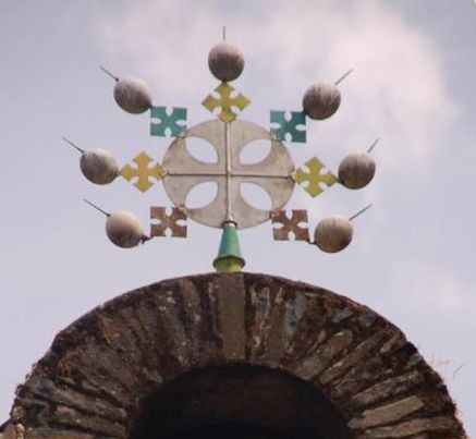 Détail_croix_Debre_Berhan_Selassie